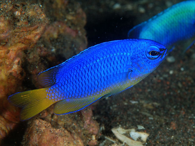 ソラスズメダイ Pomacentrus coelestis